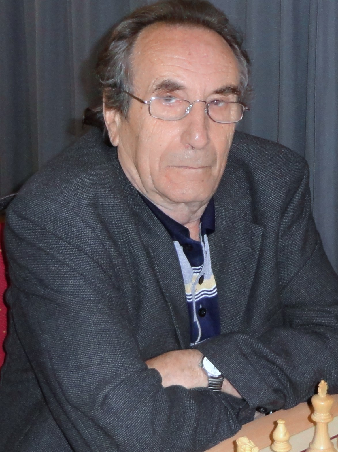 Boris Khanukov, Deutsche Schachmeisterschaft der Senioren 2013 in Oberhof (Thüringen).